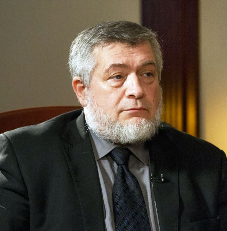 Авигдор Валерьевич Эскин (род. 1960) — израильский публицист и общественный деятель